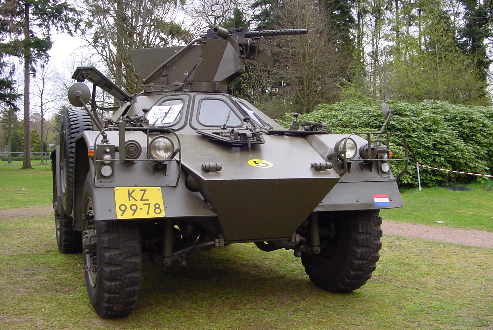 zelf gemaakt:YP-104, YP-dag 2004 Harskamp.